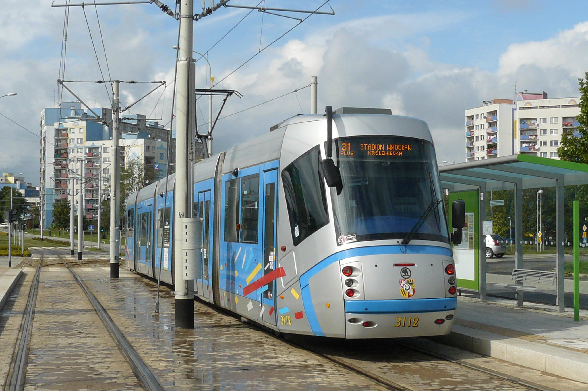 Linia tramwajowa na Kozanów, Wrocław.